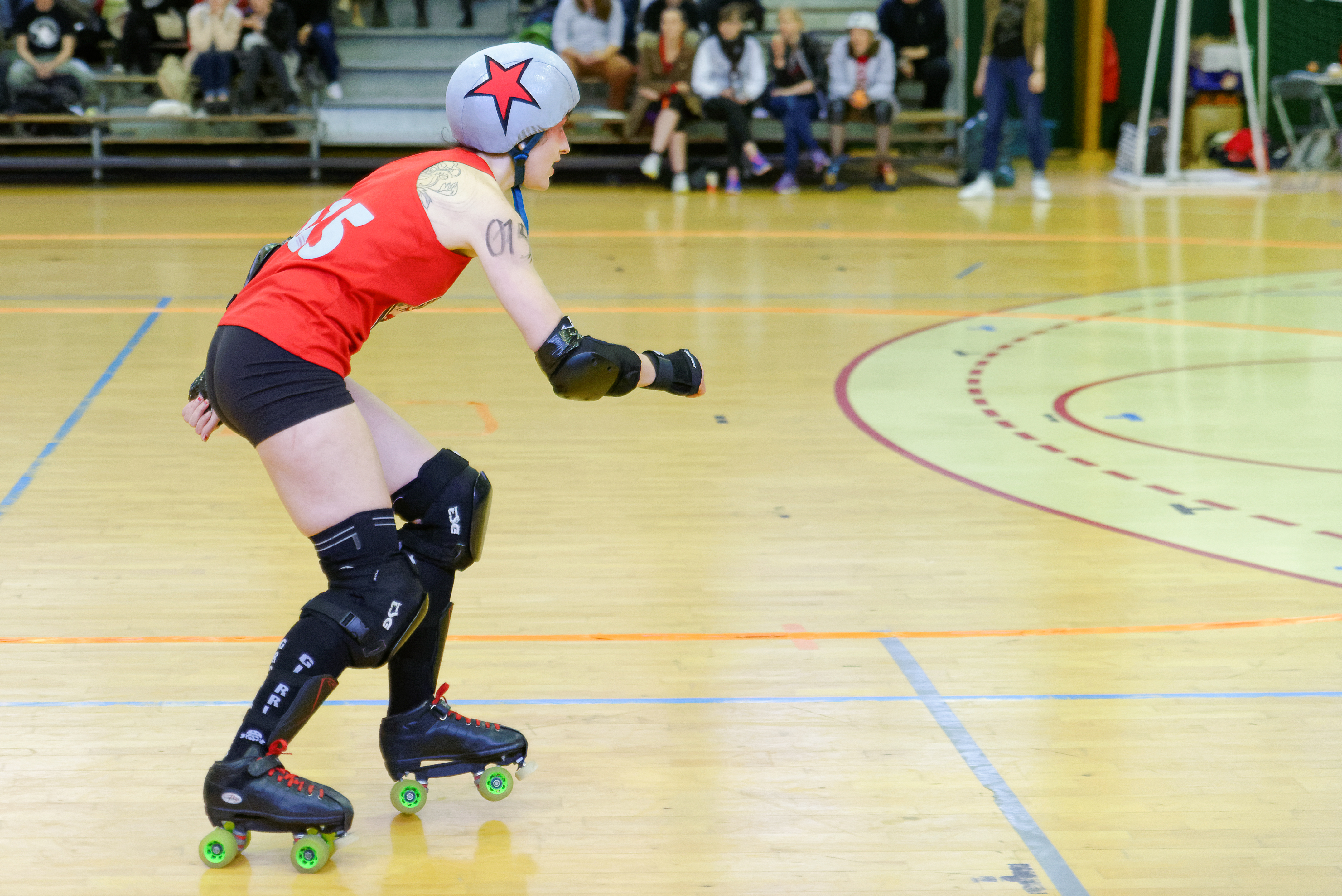 Championnat de France Roller Derby Nationale 2 Zone 5 Plateau 5. Rencontre Knee Breakers On Wheels / Roller Derby Belfort vs Les Grrriottes Girrrls / Lyon Roller Derby au gymnase Jean-Marc Boivin (Dijon, Côte d'Or, Bourgogne-Franche Comté, France).